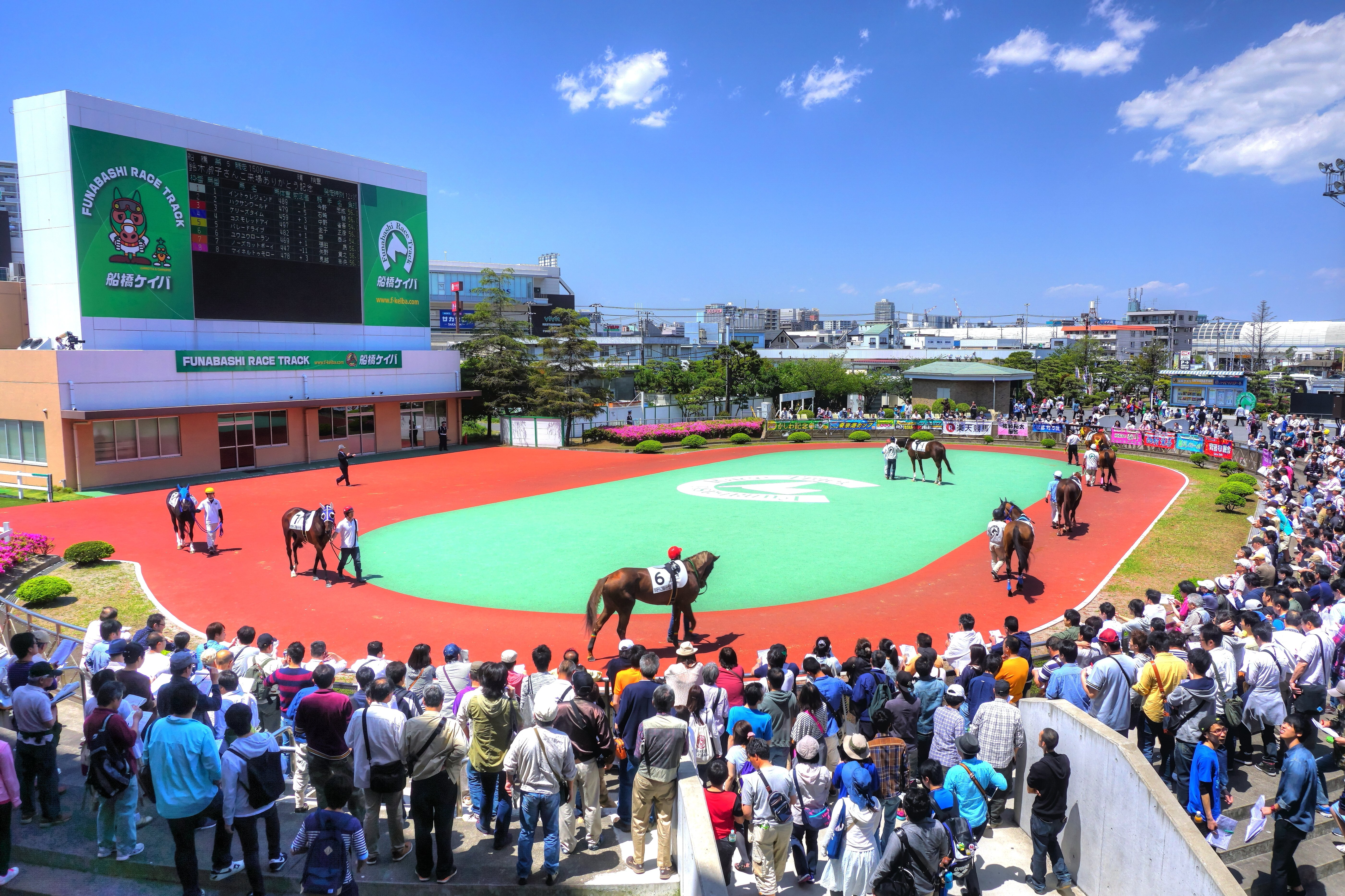 千葉県船橋市、船橋競馬場、パドック